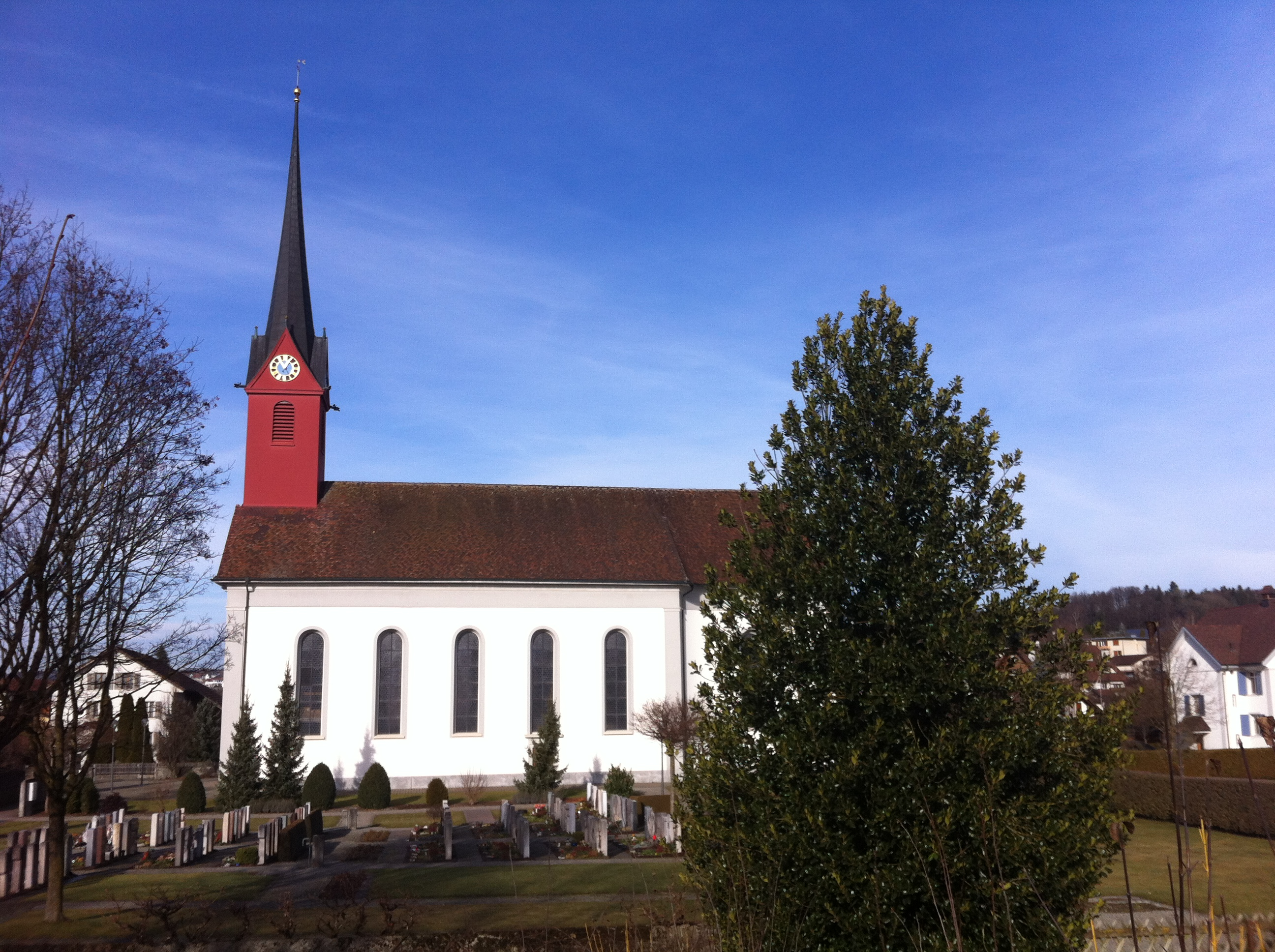 Kirche Waltenschwil